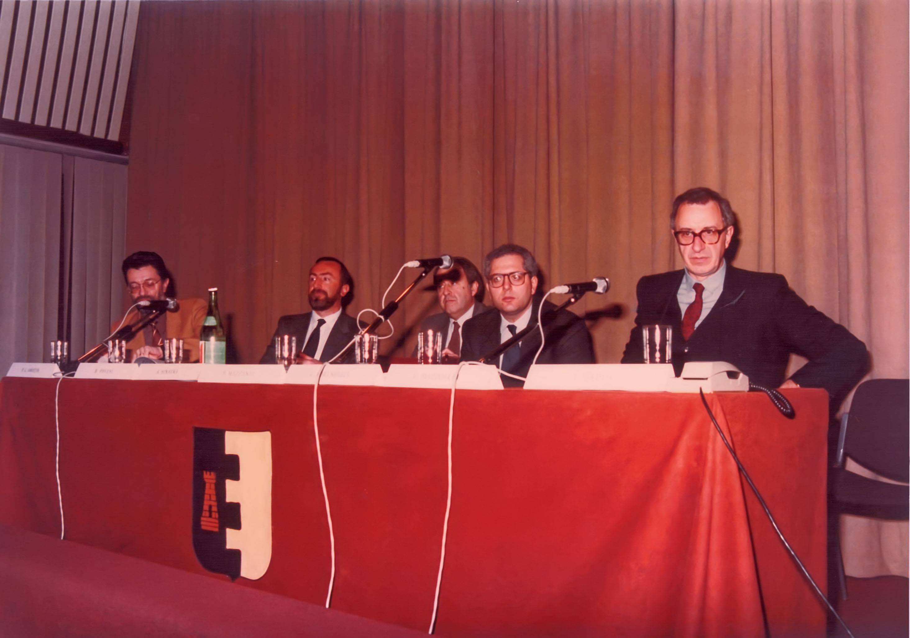 Primo convegno del Progetto PIU